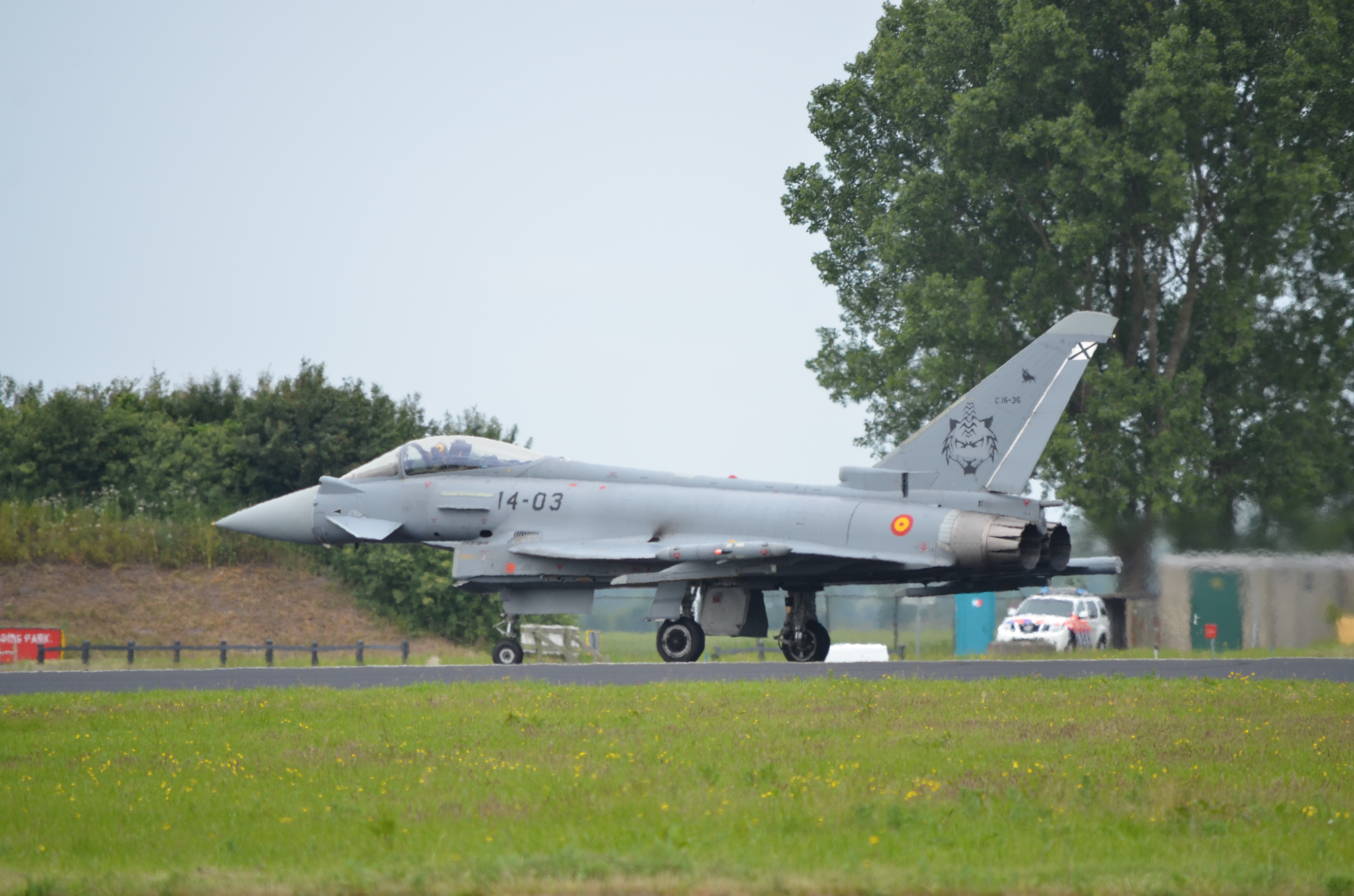 Luchtmachtdagen 2016